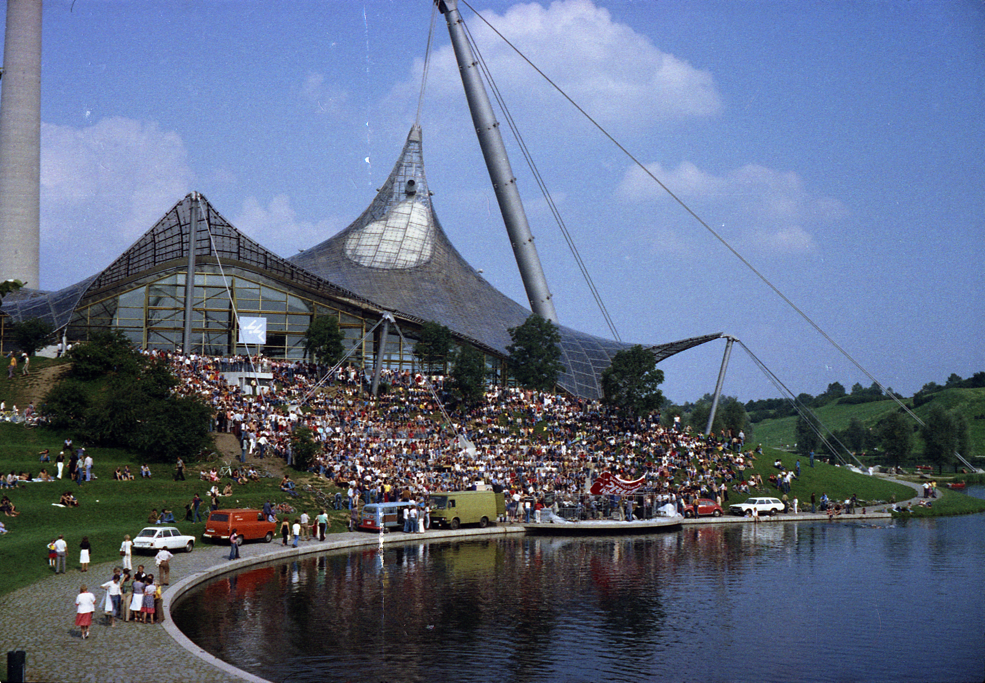 Olympiasee in München